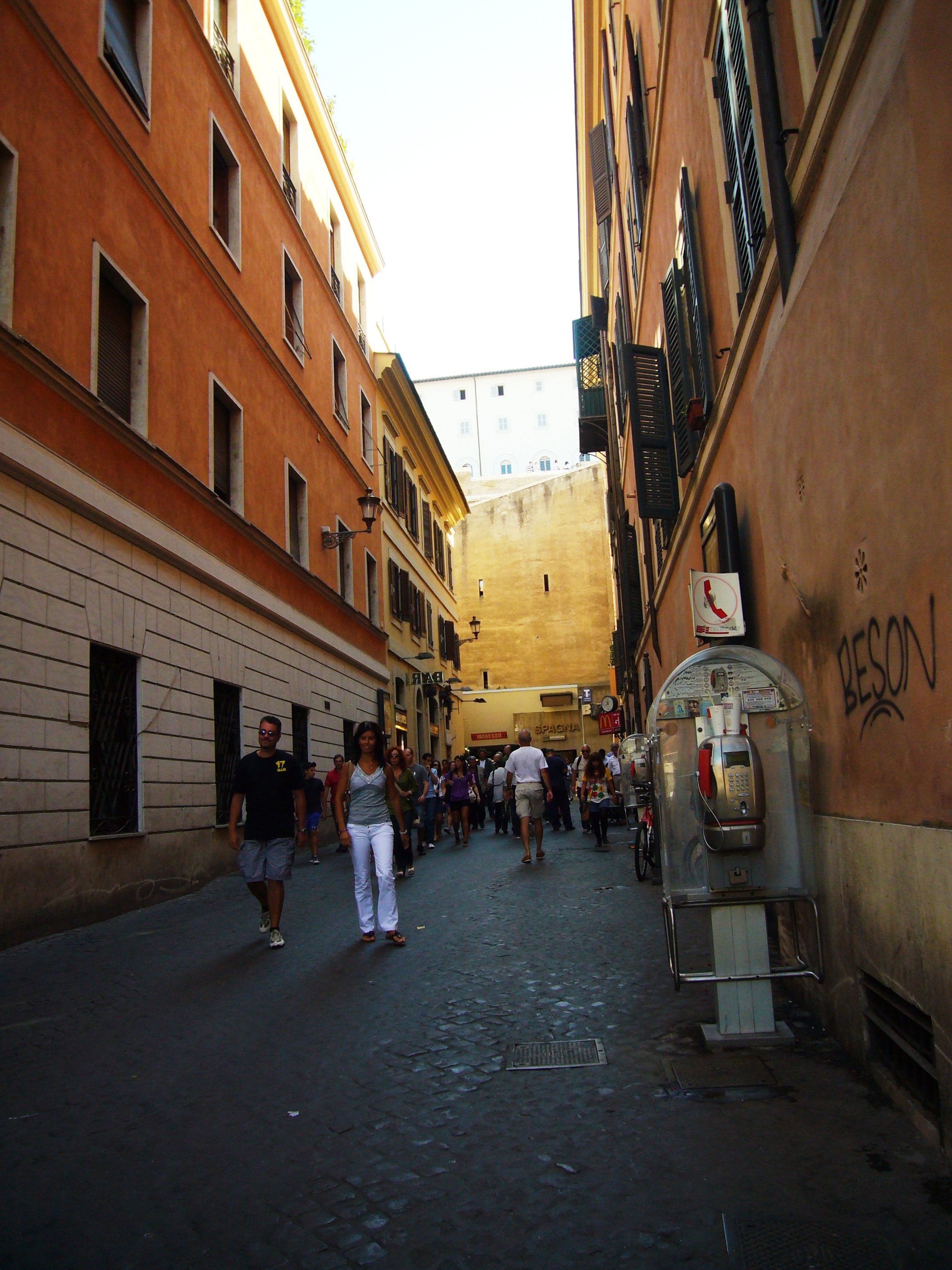 Roma, metro A Spagna - ingresso da vicolo del Bottino